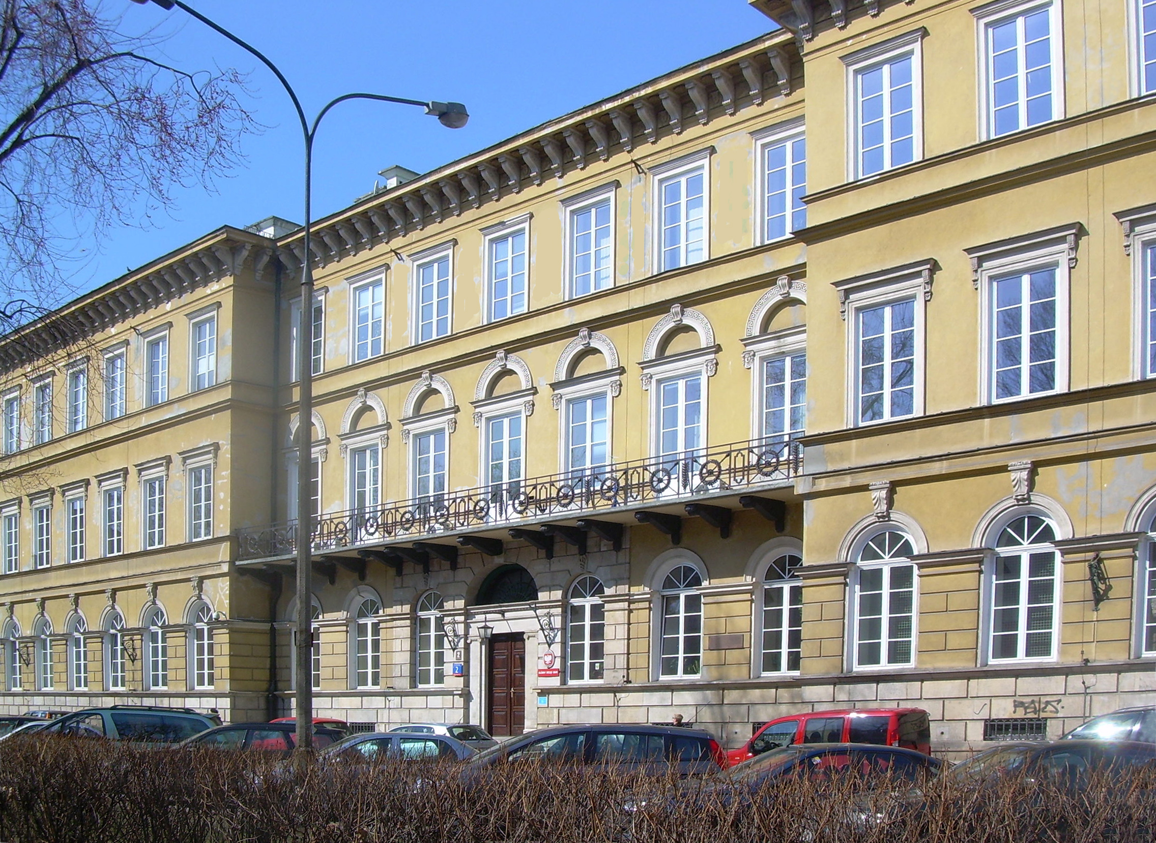 Budynek Głównego Urzędu Miar od frontu